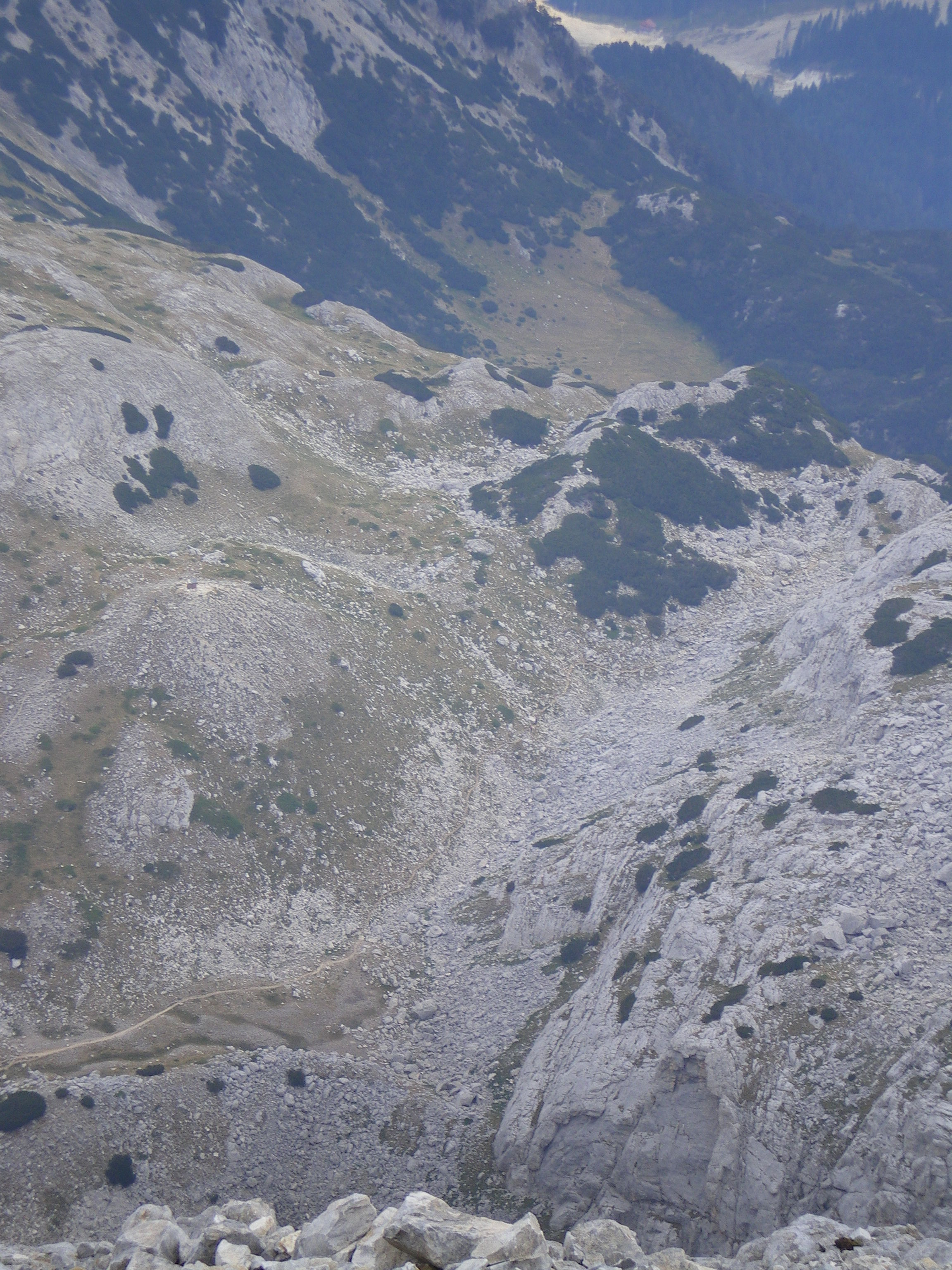 Kazanite under Vihren, Pirin, Bulgaria